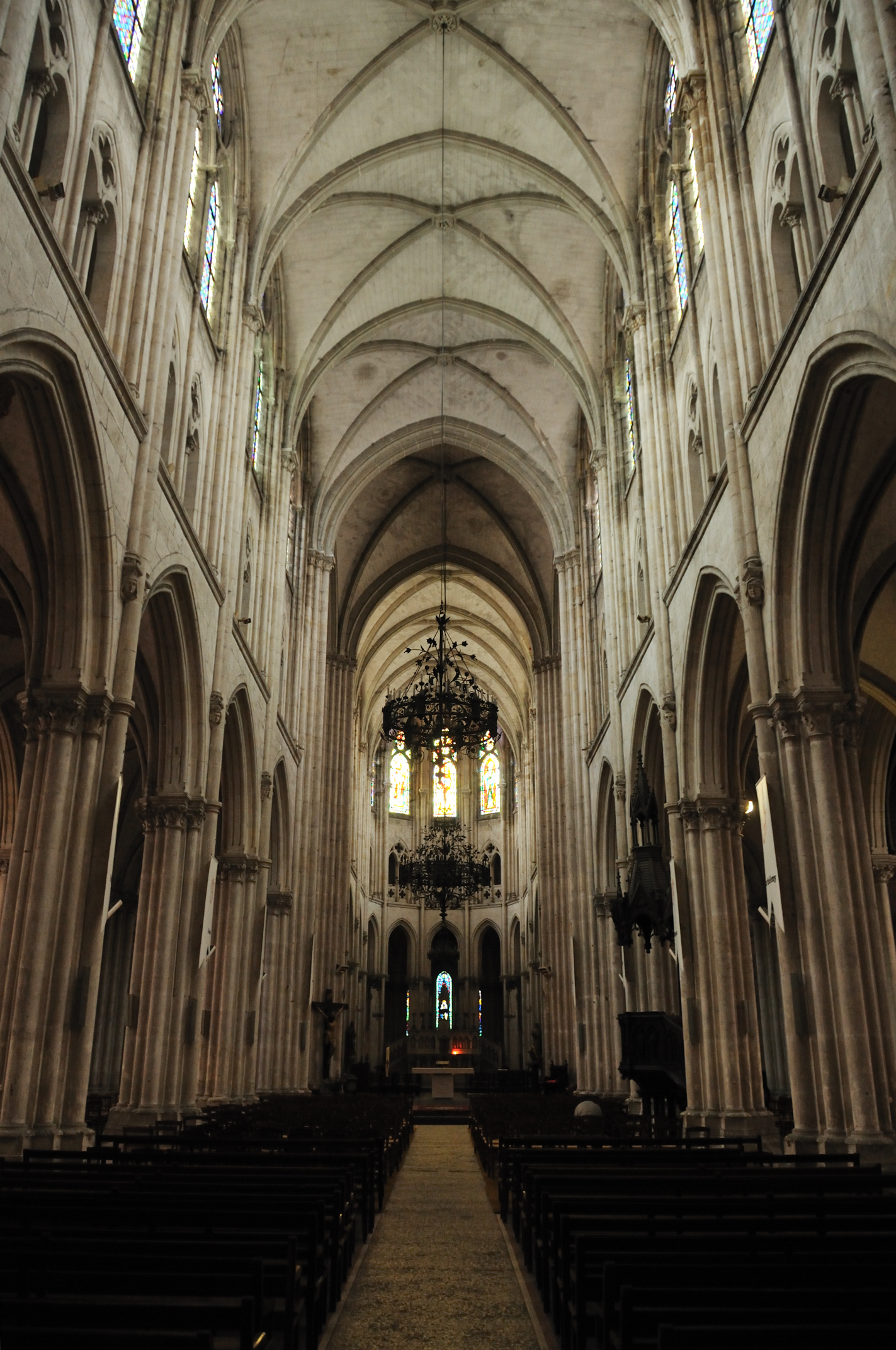 Nef de l'église Saint-André, Châteauroux, Indre, France